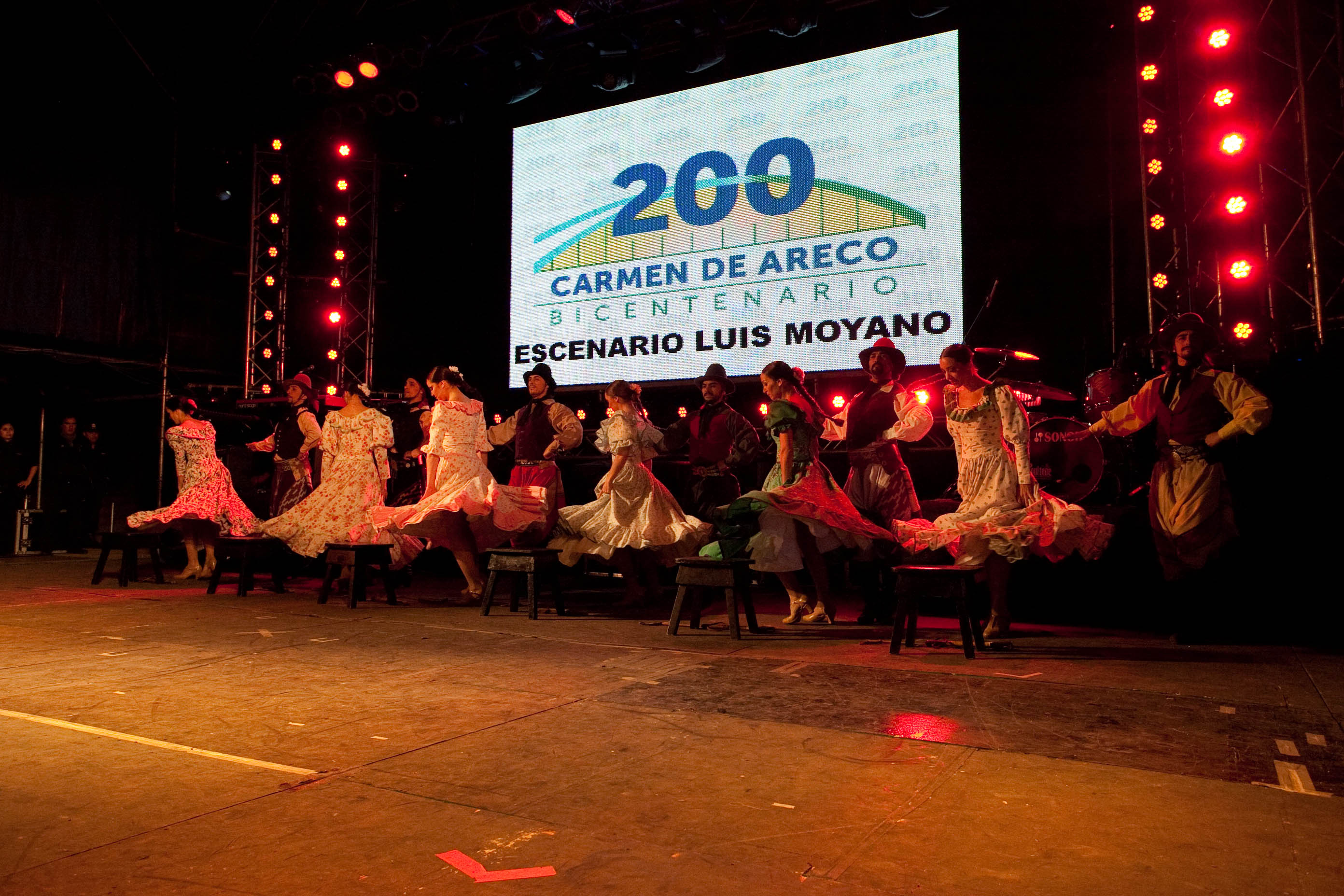 Ballet Folklorico Nacional Argentino en el Bicentenario de Carmen de Areco